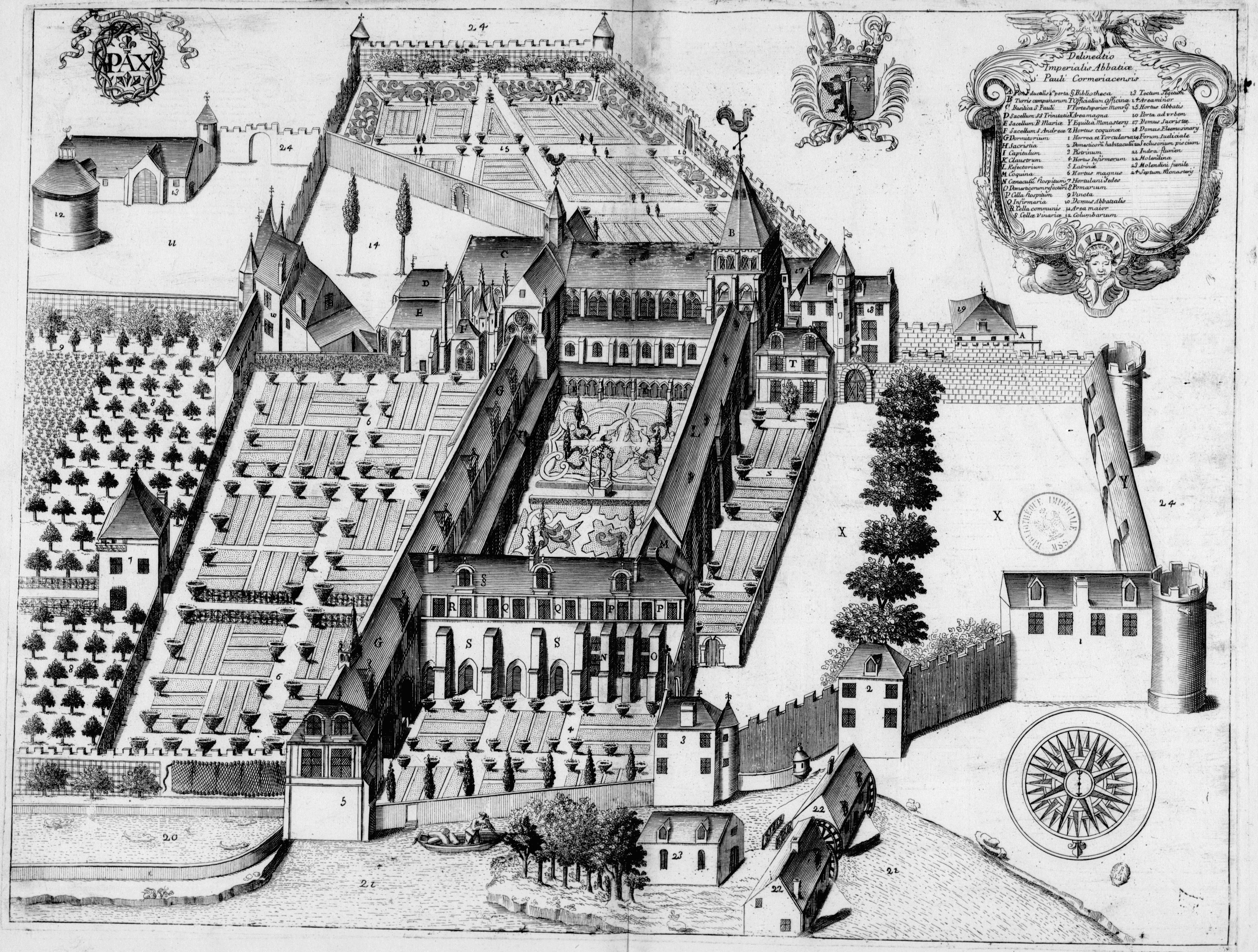 Planche gravée du 17ème siècle représentant l'abbaye Saint-Paul de Cormery, dans le livre Monasticon Gallicanum.